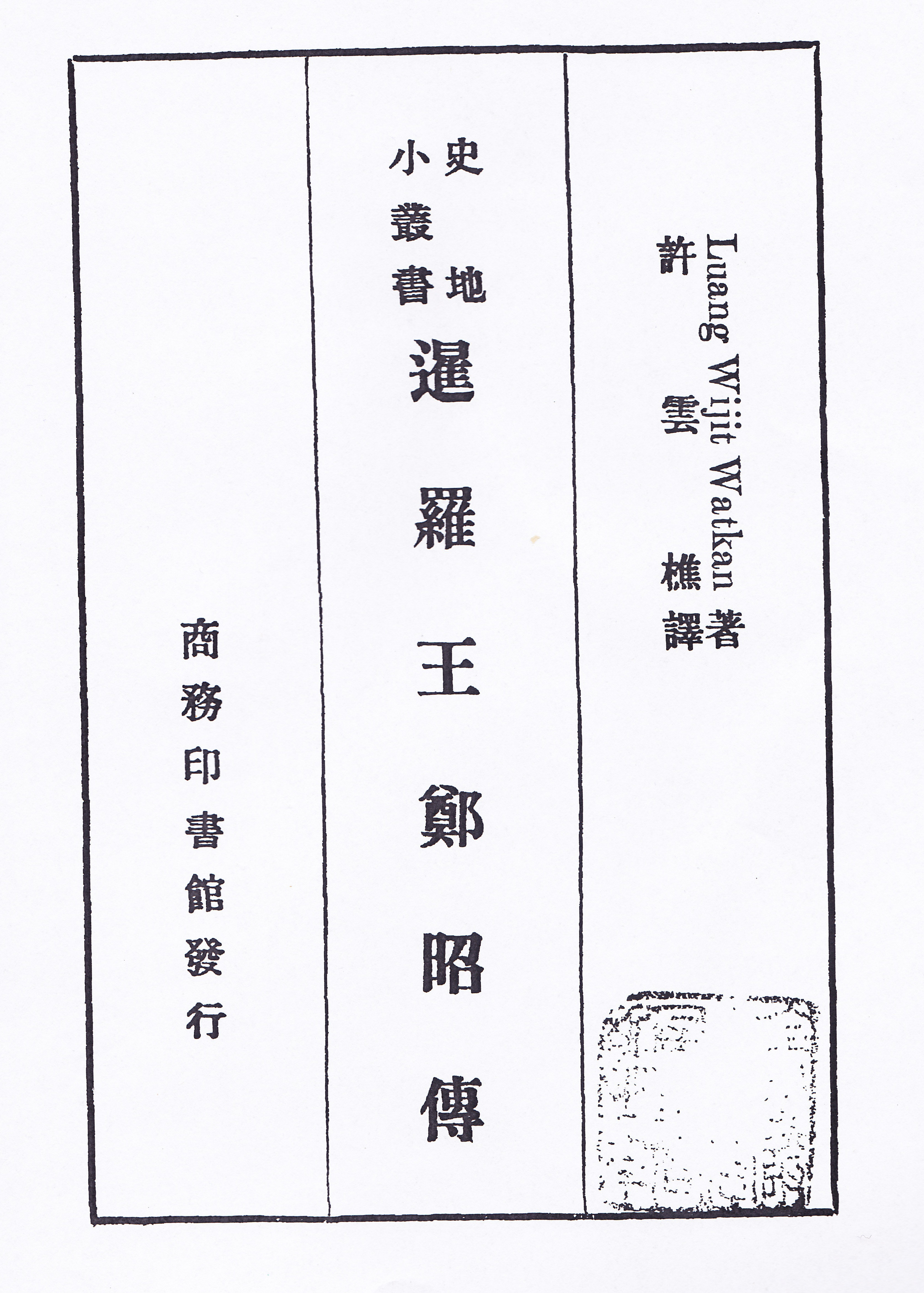 中文（中国大陆）: 许云樵著 暹罗王郑昭传 商务印书馆 1936